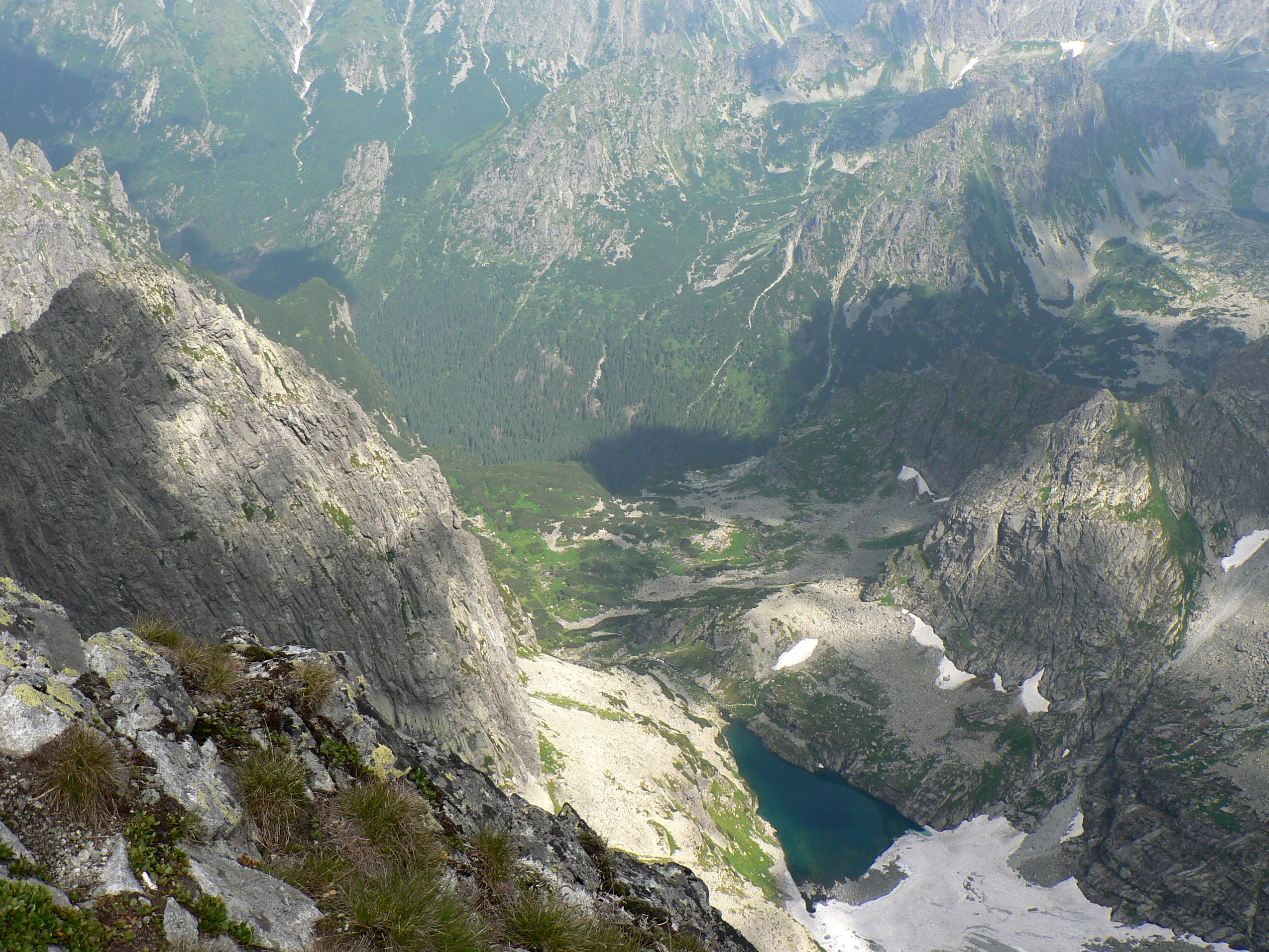 Zmarzły Staw w Dolinie Ciężkiej z drogi na Rysy